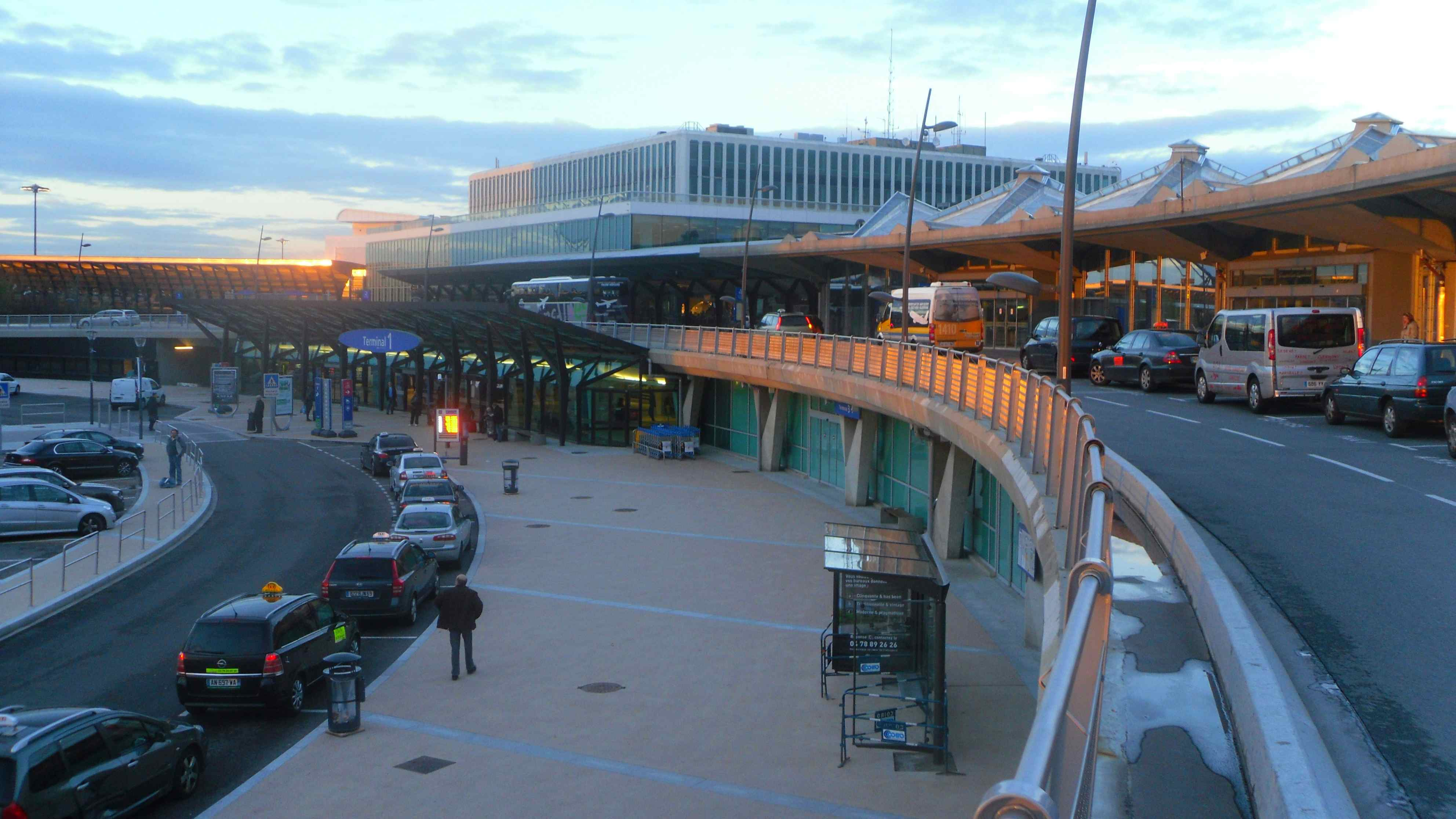 Eingangsbereich des Flughafens Lyon St.Exypéry